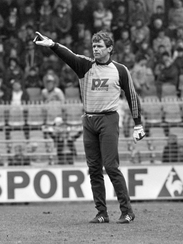 Doelman Jan Jongbloed ( GA Eagles ) in actie.